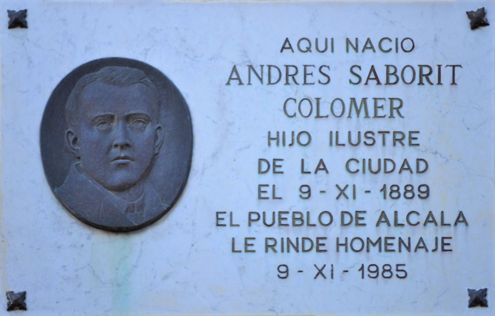 Lápida de mármol, con relieve de bronce, en memoria de Andrés Saborit Colomer. Ubicada en la fachada de su casa natal de Alcalá de Henares, en la calle del Ángel nº 2, el 9 de noviembre de 1985.